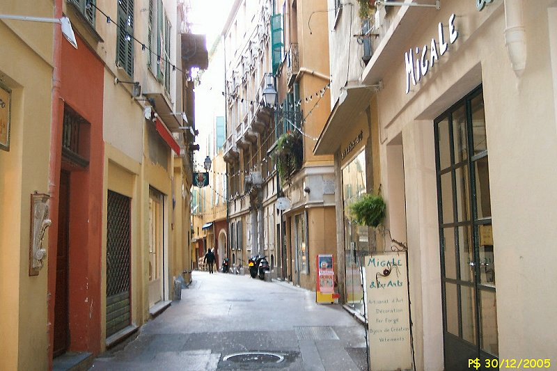 Nice - Quartier de la Vieille Ville Le Palais Lascaris. Début de la rue Droite qui mêne au bord de mer, direction Sud. Le manque de recul dans l'étroitesse de ces ruelles empêche toute vue de face de face.